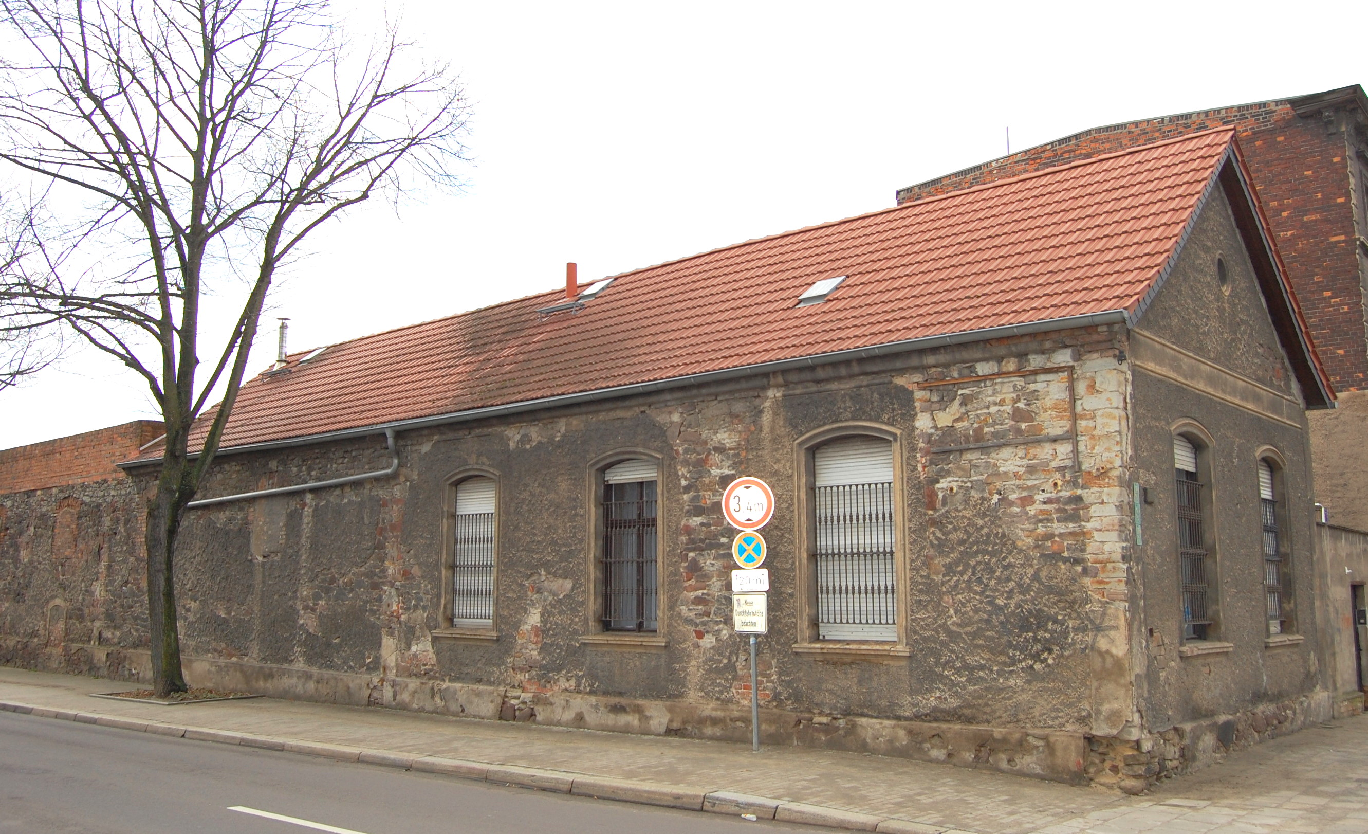 denkmalgeschütztes Gebäude der ehemaligen Glashütte Dörries in Magdeburg-Salbke